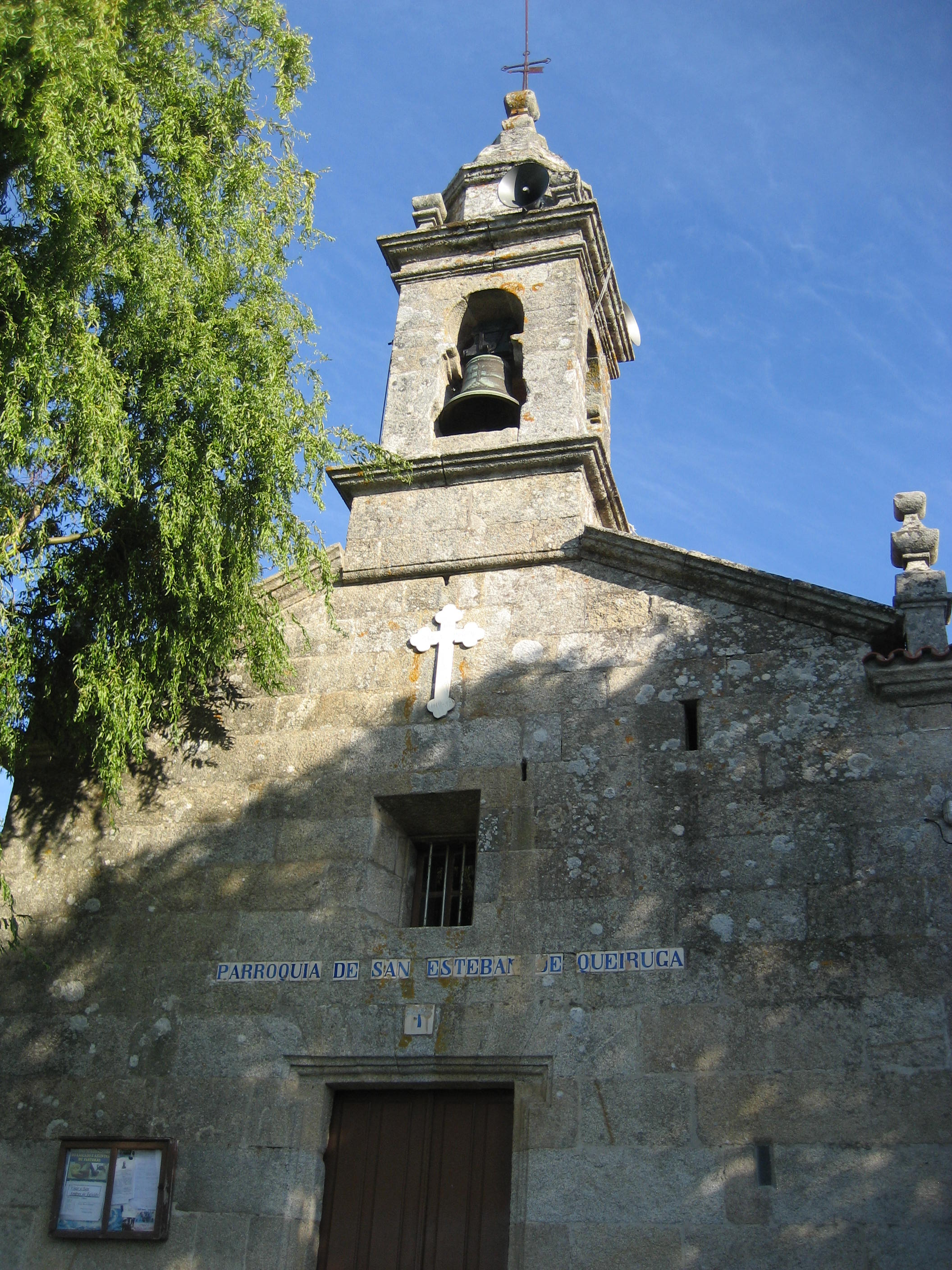 En Porto do Son